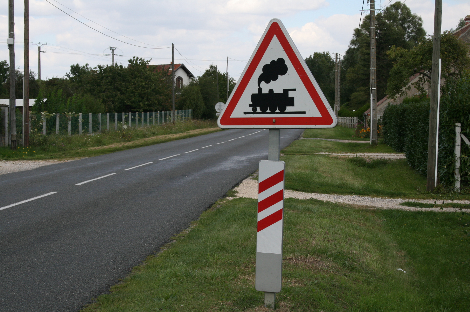 Panneau A8 de signalisation de passage à niveau non gardé avec balise J10 (France)